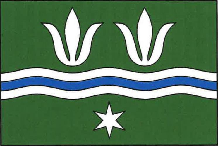 Číchov vlajka